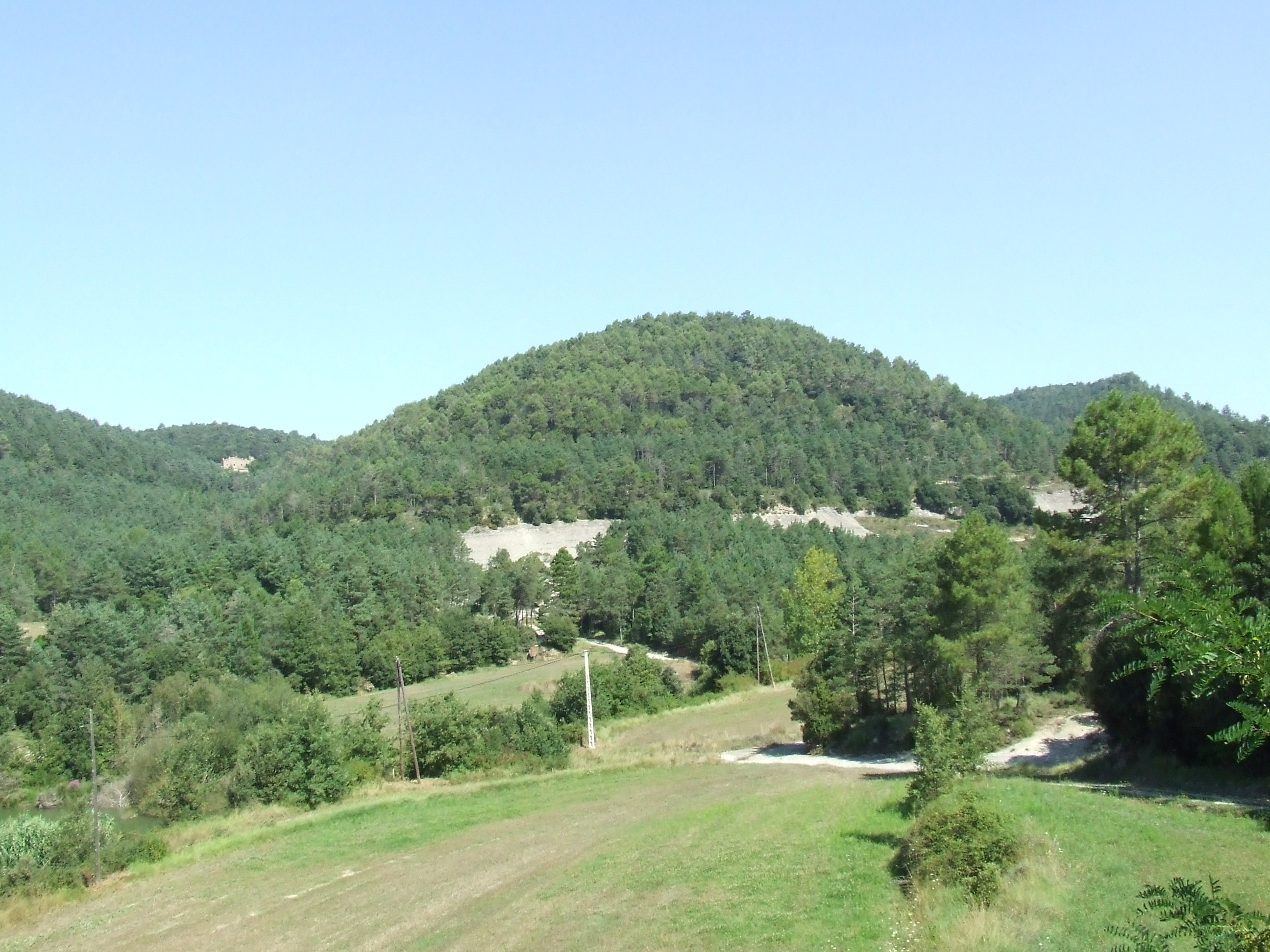 El Turó de Vilacís (Castellcir, Moianès)